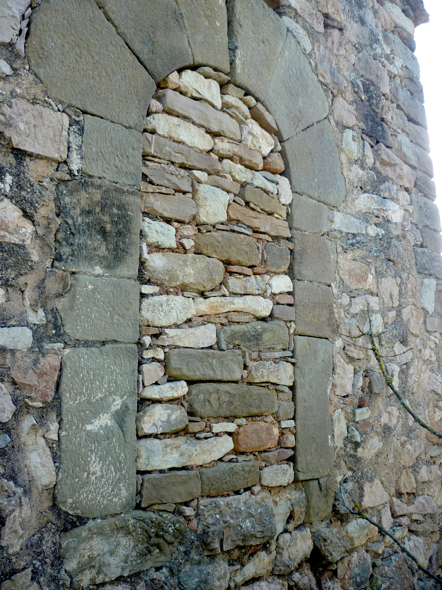 Església de Sant Marc de Pallerols de Rialb: porta a ponent tapiada (la Baronia de Rialb)